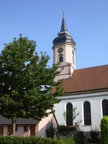 Eglise St Arbogast de Duppigheim